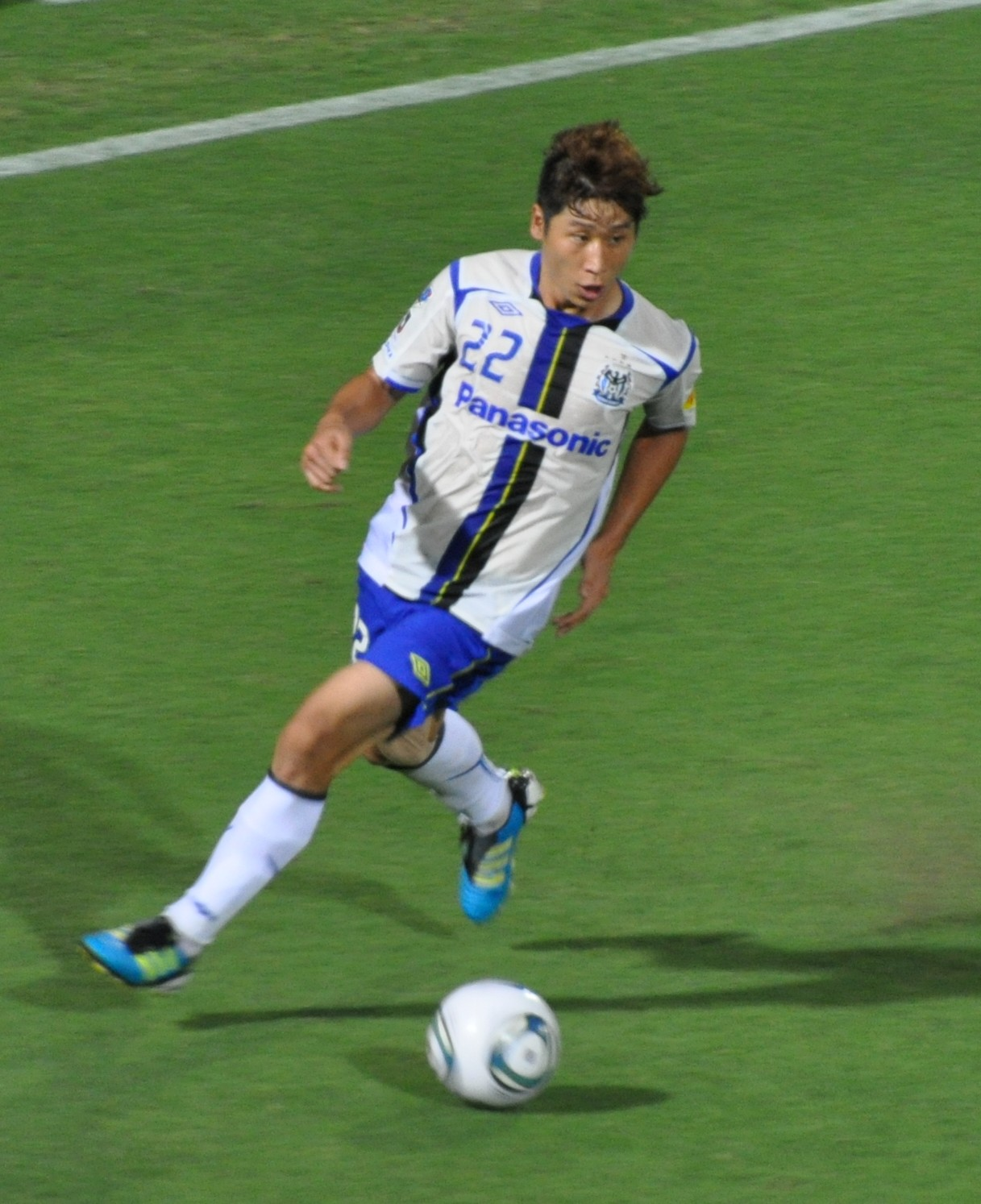 Lee Keun-Ho playing for Gamba Osaka 2011.07.10 Omiya Ardija 2-3 Gamba Osaka_290